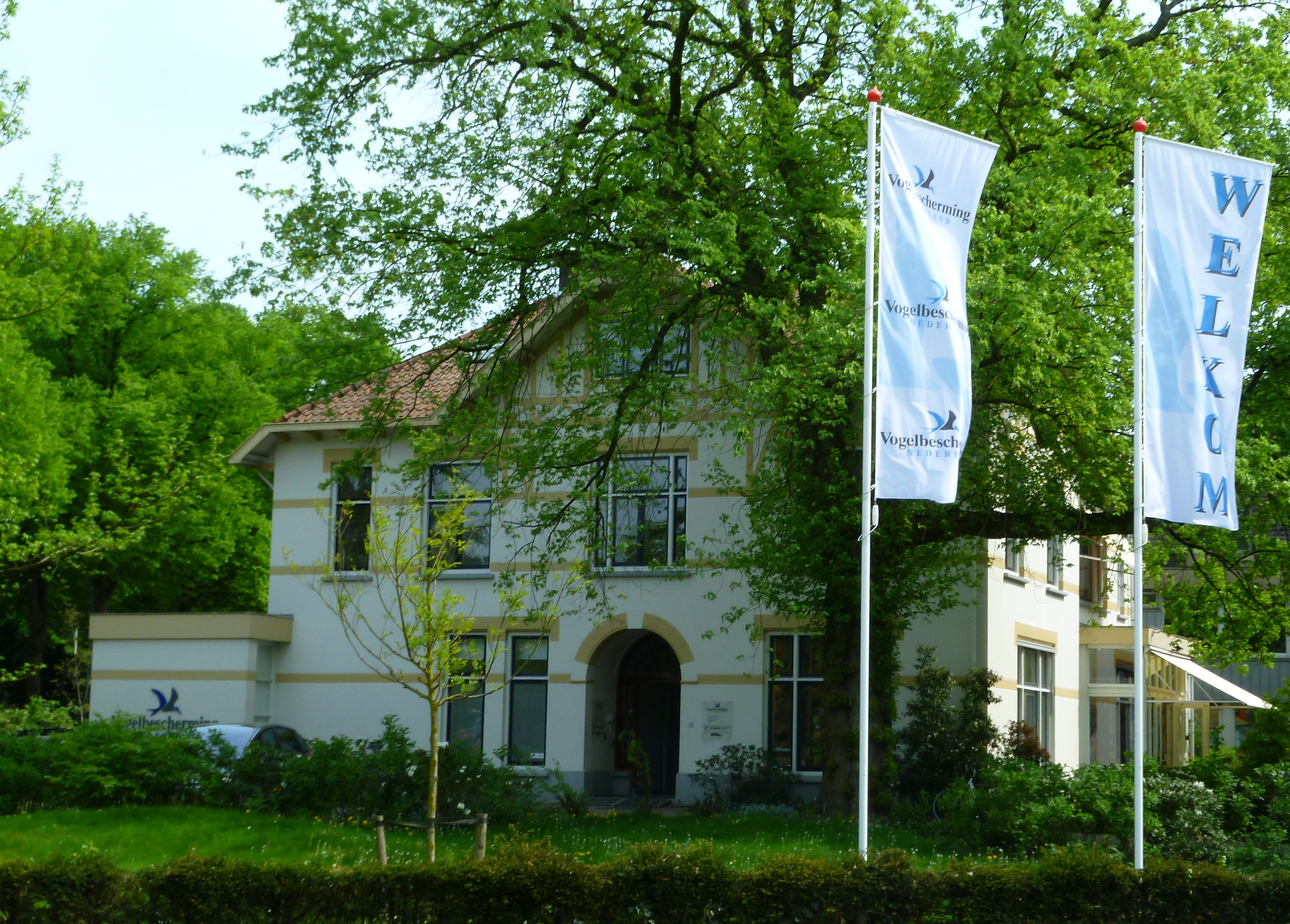 Het pand van Vogelbescherming Nederland, met daarin het verenigingsbureau en de winkel.